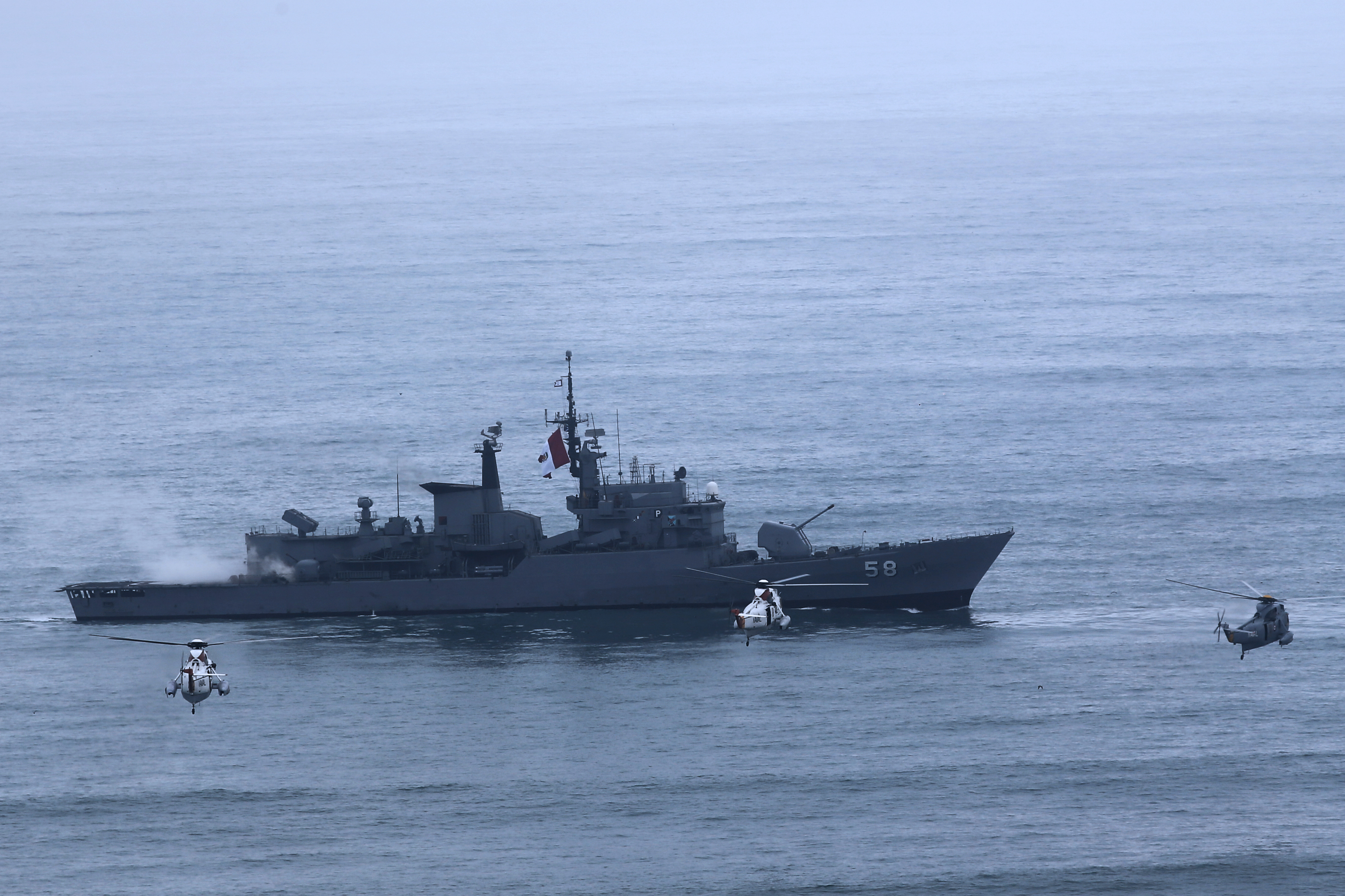 DESFILE ÁEREO Y NAVAL POR EL 194 ANIVERSARIO DE LA INDEPENDENCIA NACIONAL; Demostración del poderío de las Fuerzas Armadas del Perú